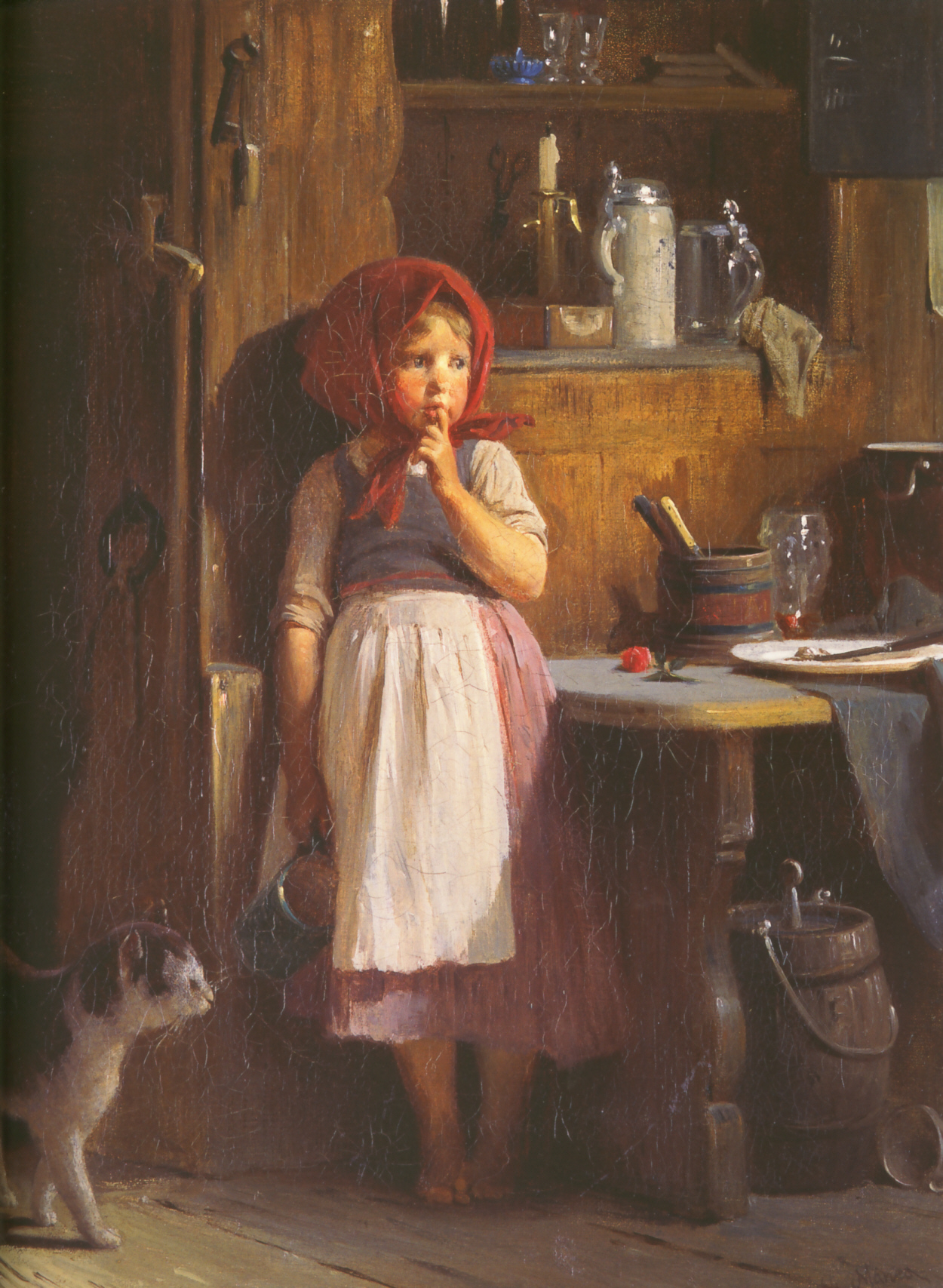 Quido Mánes: Mädchen (Sammlung Kooperativa), um 1860, Öl auf Leinwand, 38 x 31 cm